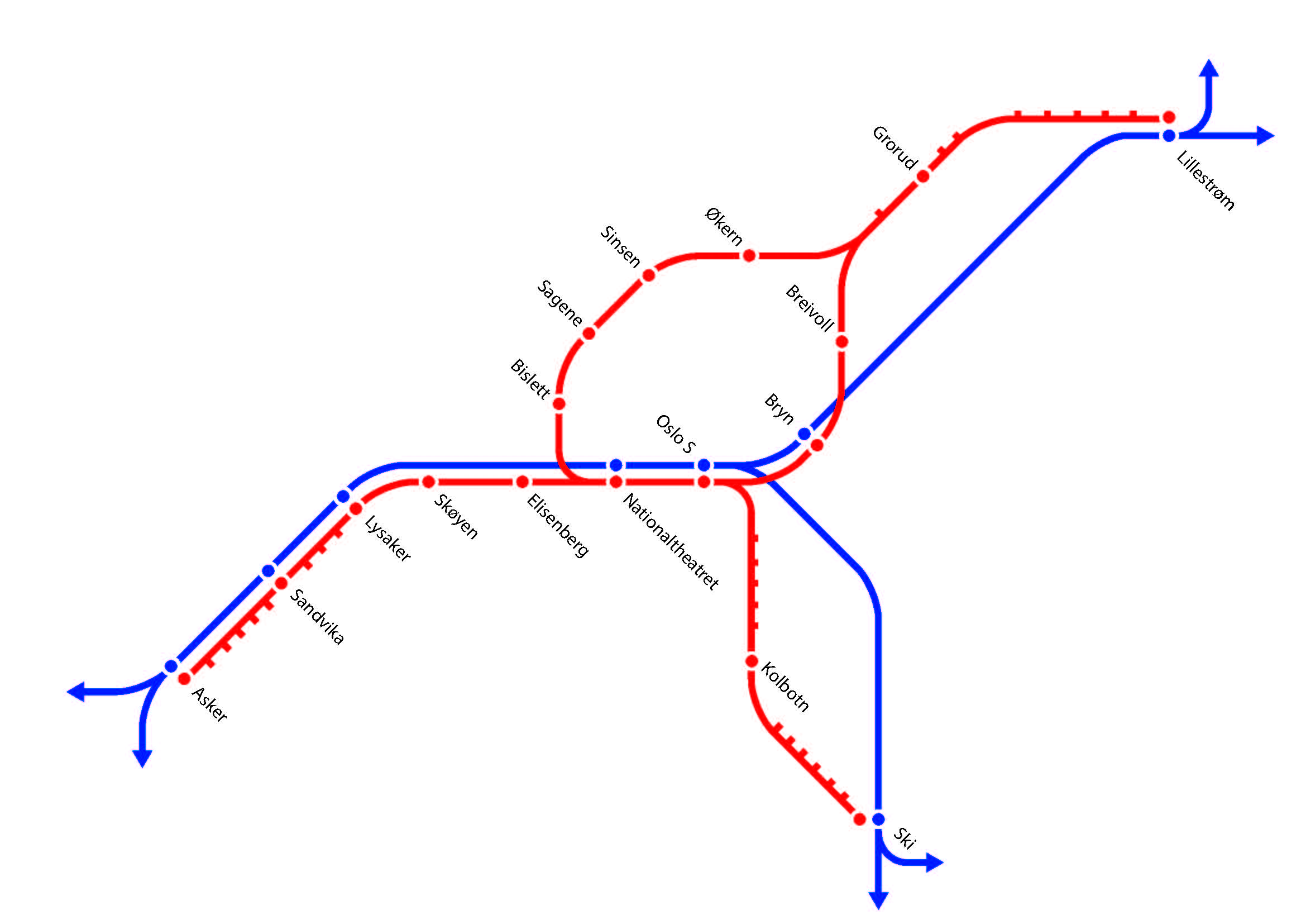 Skjematisk fremstilling av mulig fremtidig jernbanenett i Tettstedet Oslo for persontrafikk i Vest-, Øst- og Sør-korridoren. Regiontrafikk markert i blått, lokaltrafikk (S-bane) markert i rødt ("hakk" betyr stasjon / holdeplass).